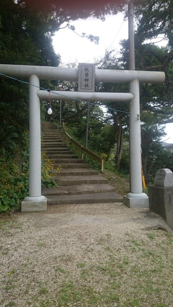 笠利市にある秋葉神社の鳥居。